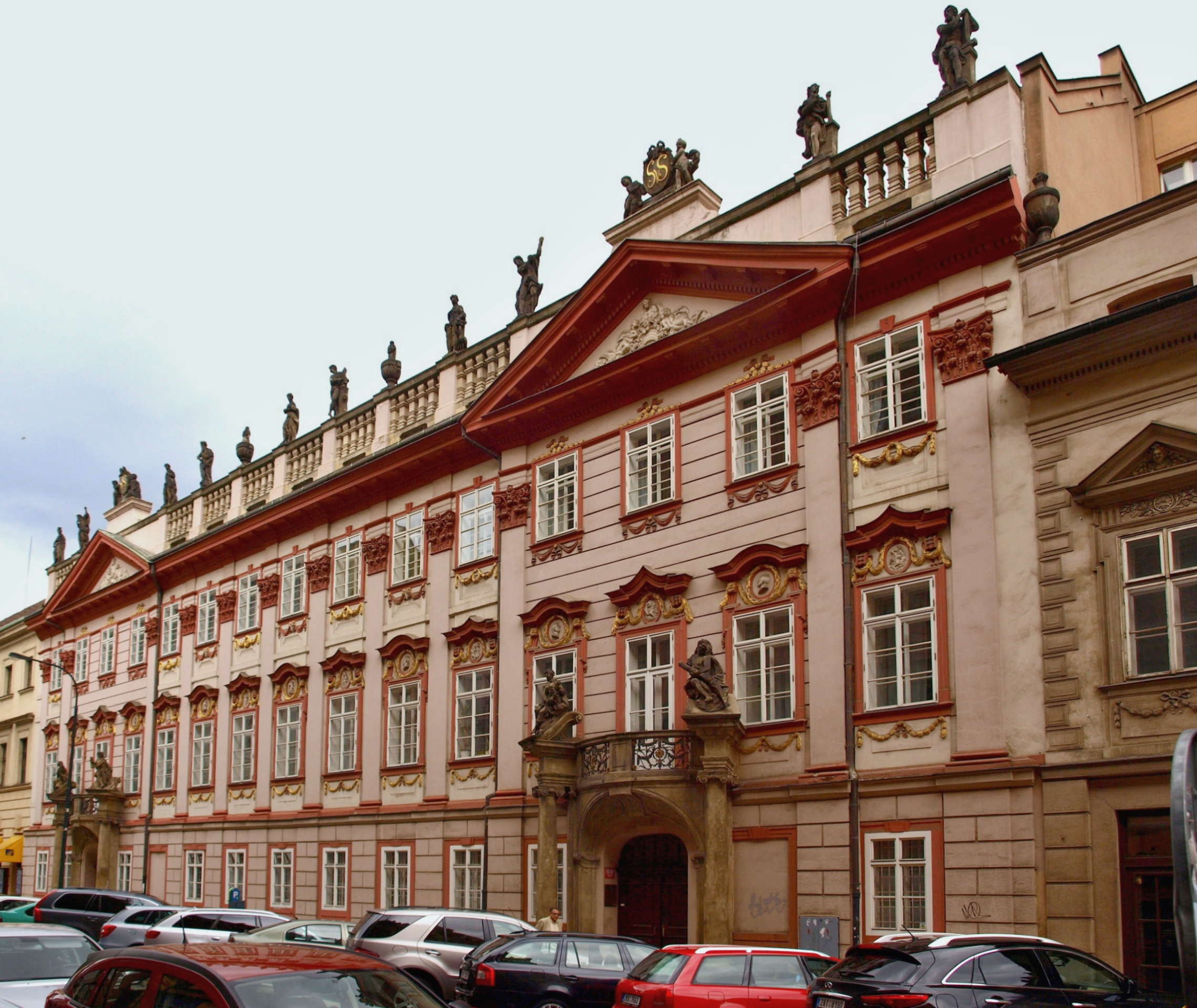 Swéerts-Šporkův palác